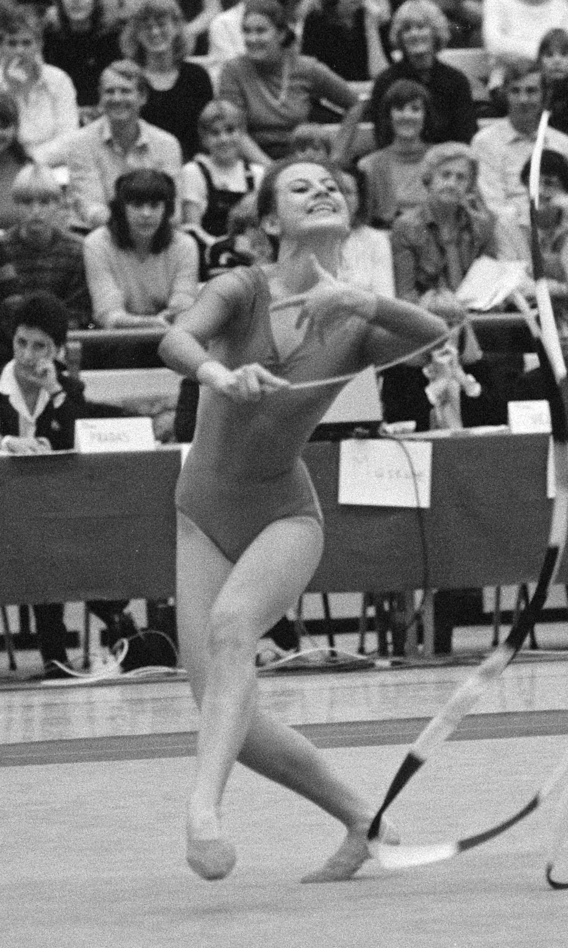 Europese kampioenschappen Ritmische Gymnastiek in Amsterdam, Europees kampioen werd de Bulgaarse Raeva